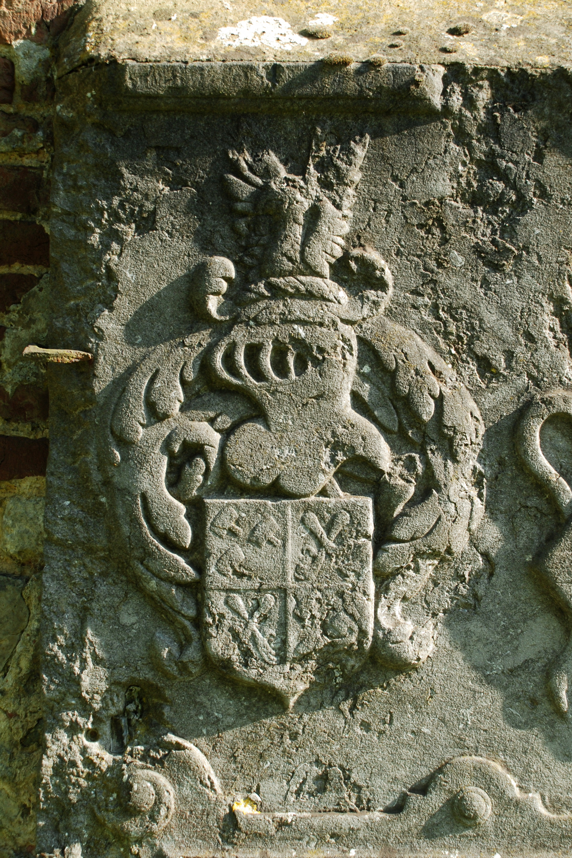 Belgique - Brabant wallon - Mont-Saint-Guibert - Église Saint-Pierre de Corbais - dalle funéraire de Jan de Pinchart (mort en 1604)